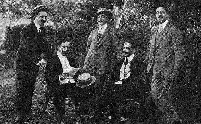 Xornalistas, escritores e artistas en Ferrol, fotografía en Vida Gallega 1909. De esquerda a dereita:Eduardo Sánchez Miño, Vicente Díaz González, Wenceslao Fernández Flórez, Joaquín Arias de Miranda e José Fitor Cabot.